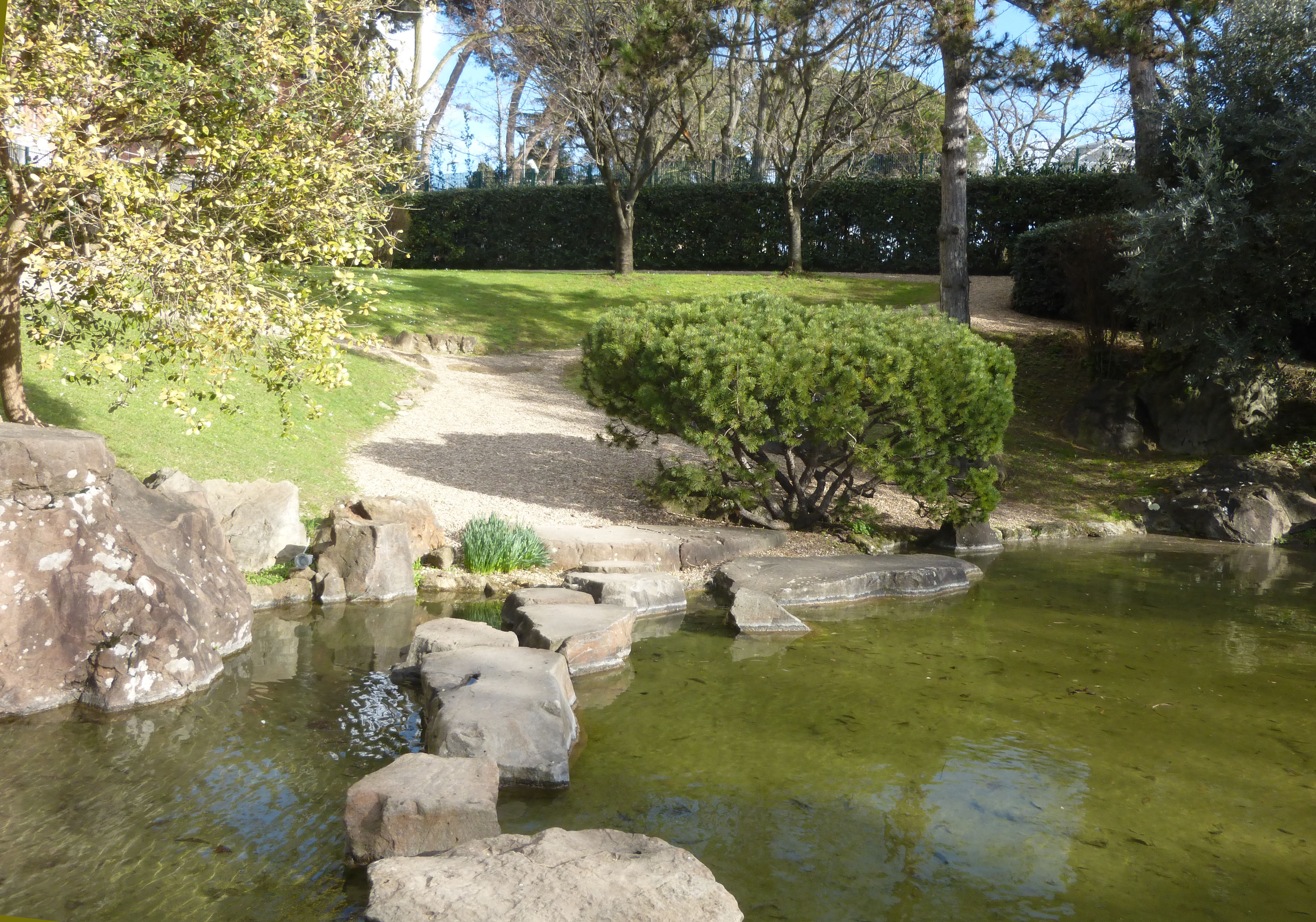 Roma, Istituto giapponese di cultura. Le pietre che attraversano il laghetto del giardino.